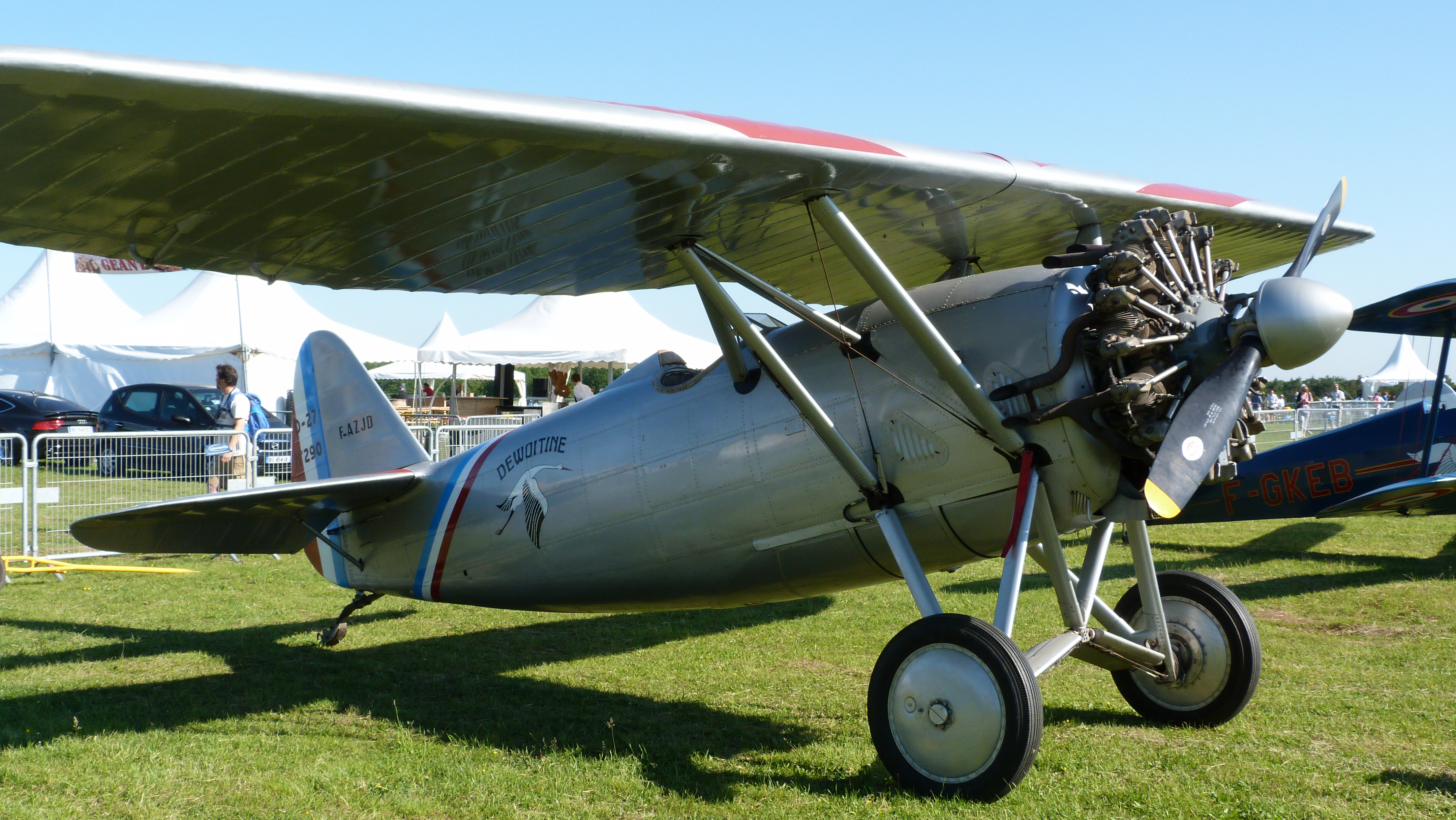 Ferté-Alais 2012